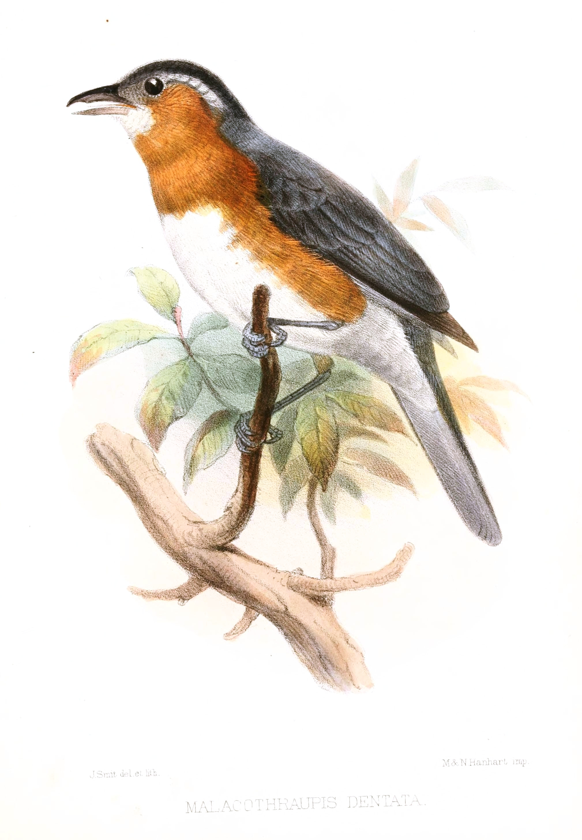 Malacothraupis dentata = Creurgops dentatus (female)